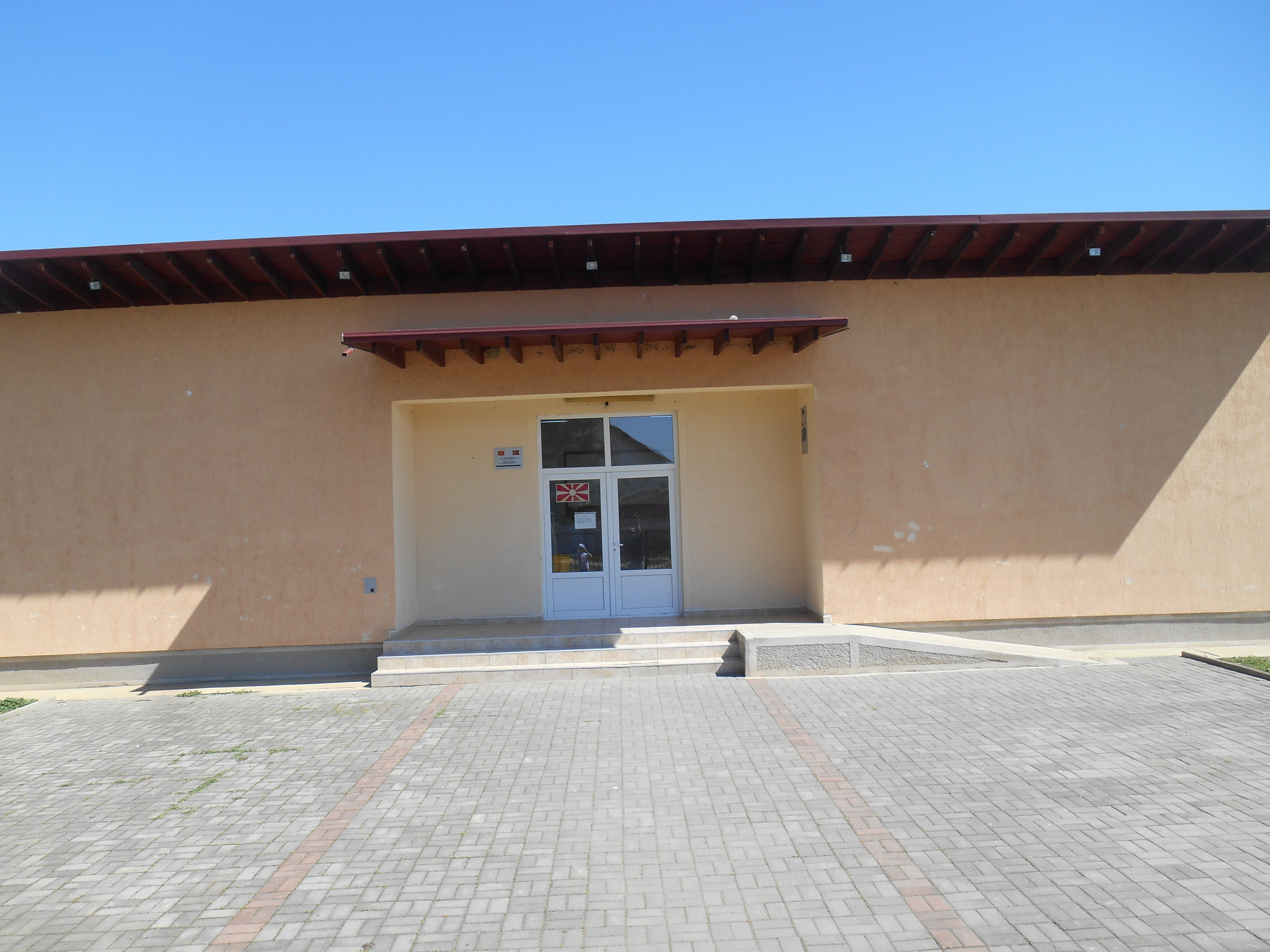 Основно училиште „Гоце Делчев“ - Гечерлија